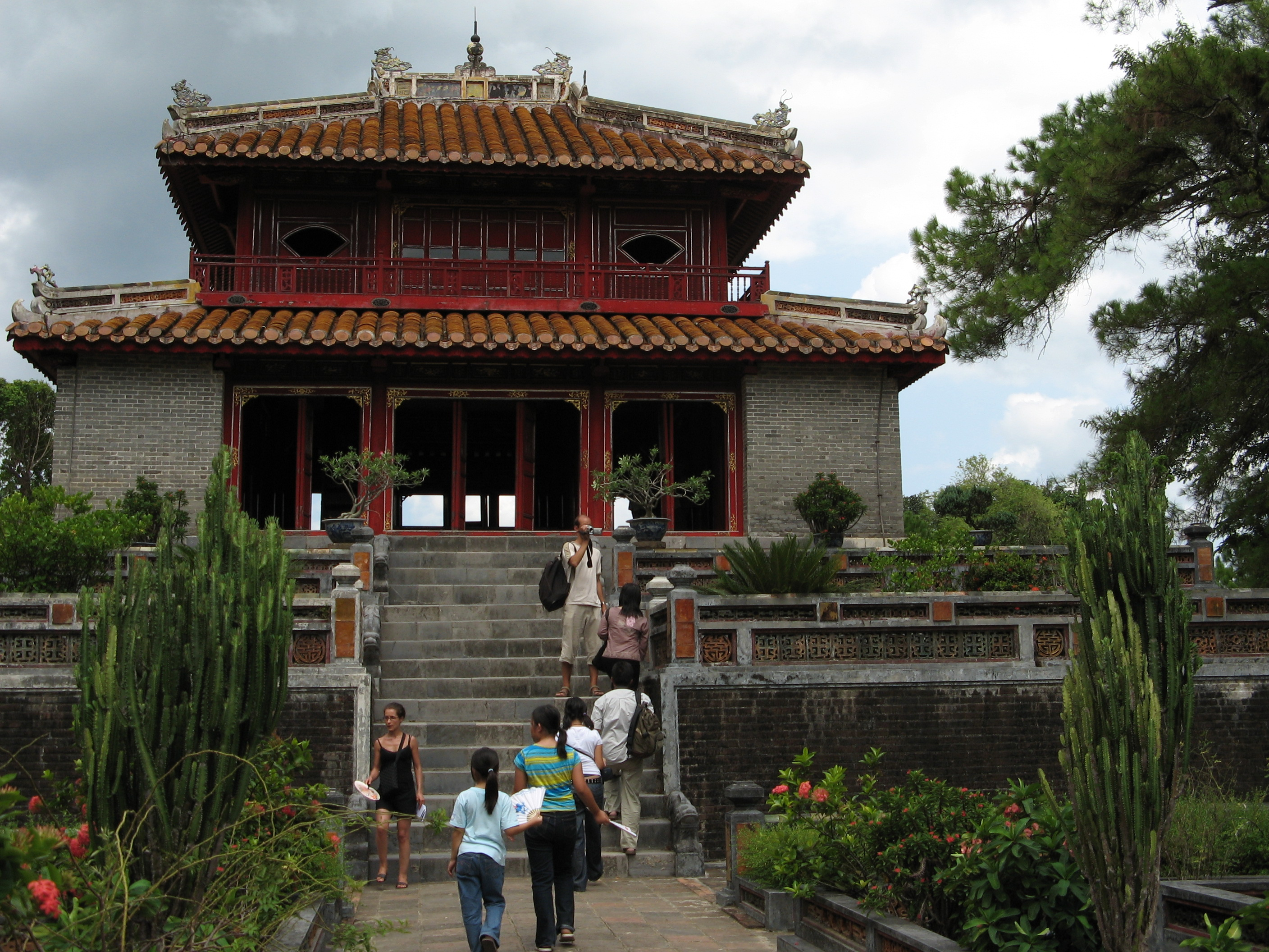 A look back at the Minh Mạng mausoleum.